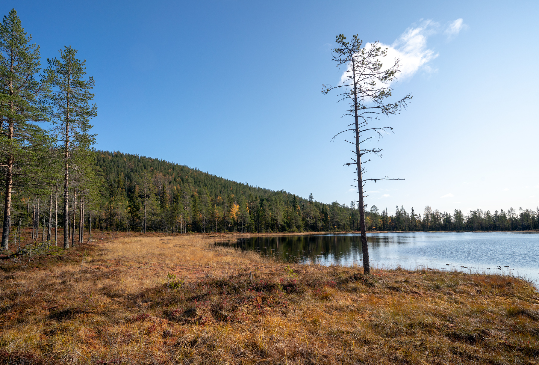 Trattbergstjärnen i naturreservatet Gammtratten.